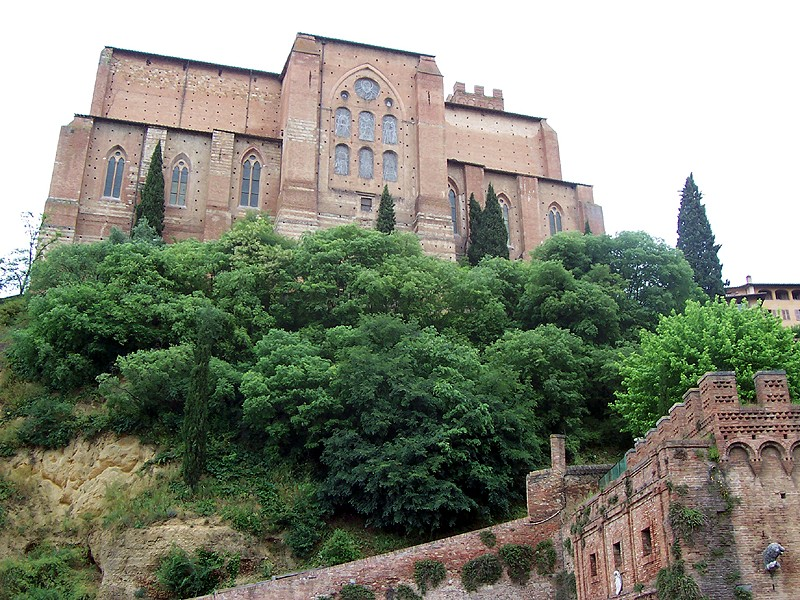 Siena - Basilica di S. Domenico (Abside)